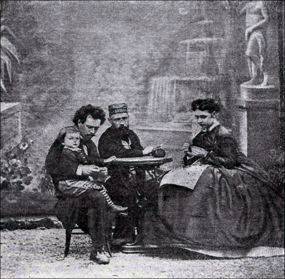 Валерий Якоби с сыном Владимиром, Павел Якоби, Александра Якоби (впоследствии А.Н.Пешкова-Толиверова)